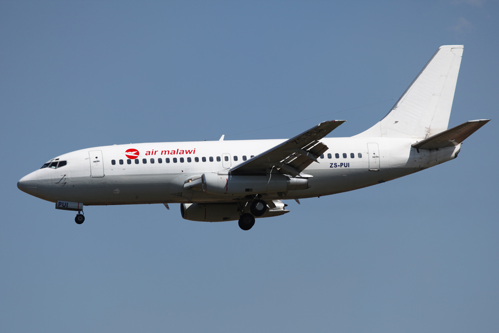 ZS-PUI B737-200 Air Malawi